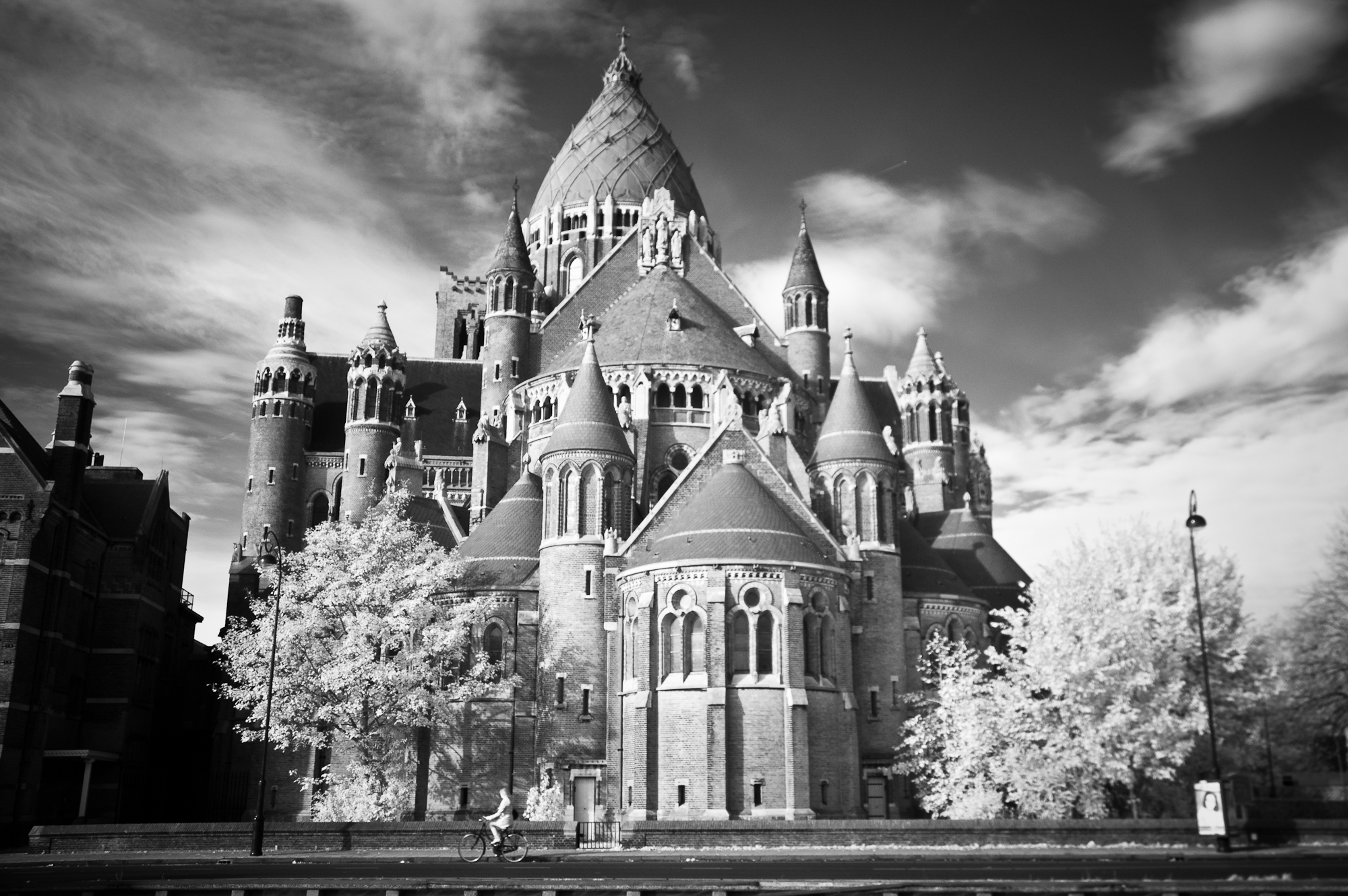 Kathedrale Basiliek Sint Bavo in Haarlem, gefotografeerd met een zelf omgebouwde infrarood camera.